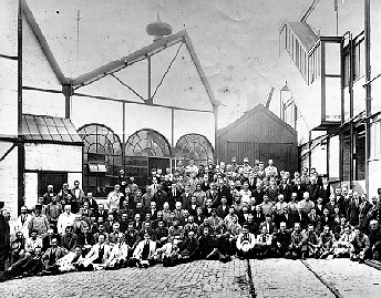 Groepsportret van werkwilligen op het fabrieksterrein van de Maastrichtsche Zinkwit Maatschappij tijdens de Zinkwitstaking van 1929. Fotocollectie RHCL Maastricht, GAM 152.